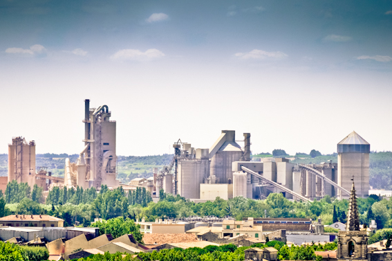 Usine des Ciments Français Italcement Group à Beaucaire (Gard), route de Fourques